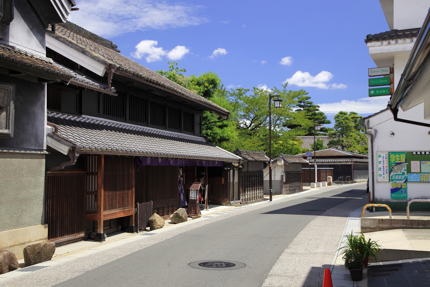 有松の歴史的町並み（名古屋市緑区、2012年）